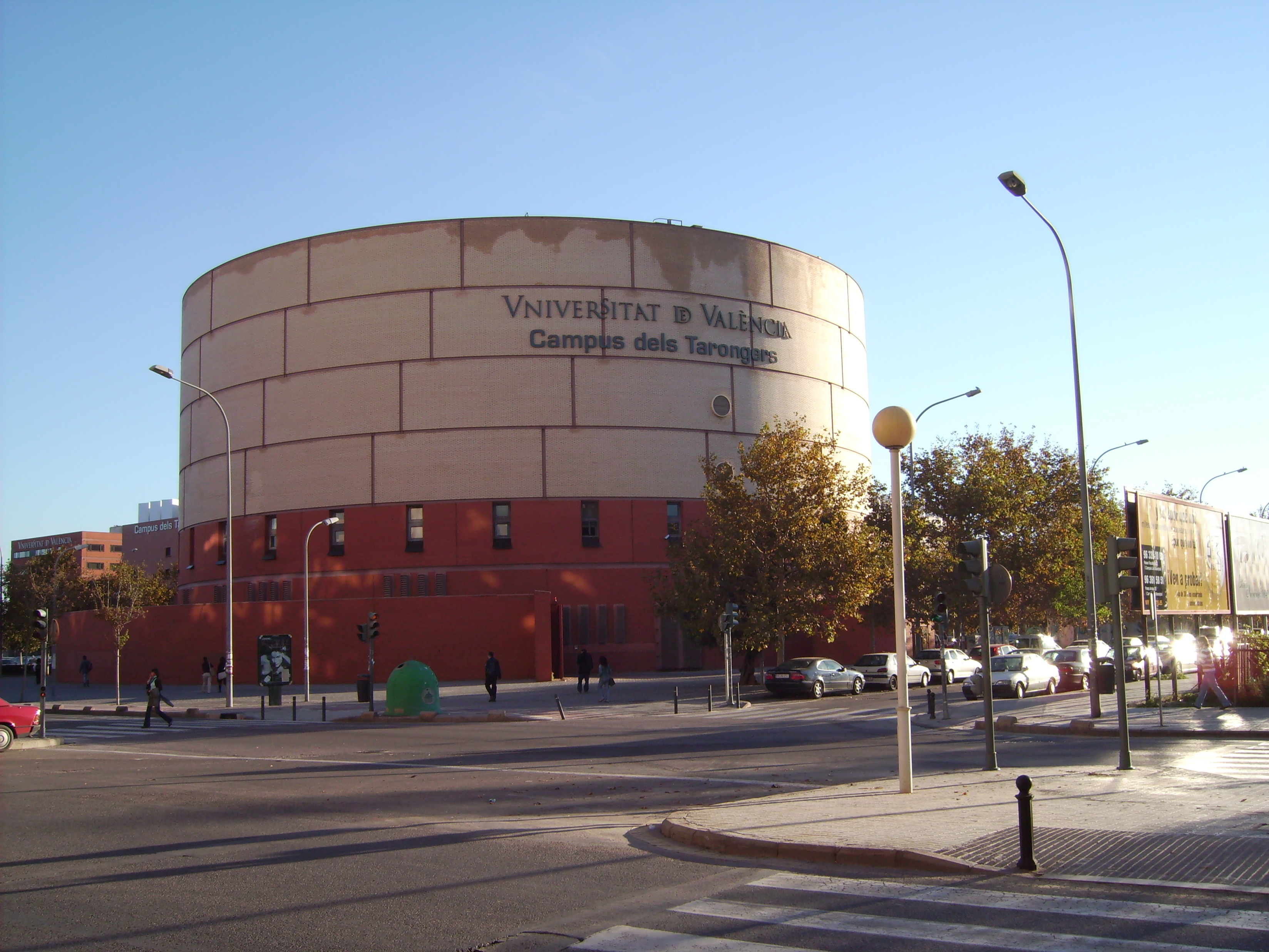 Campus dels Tarongers - Universitat de València, Valencia, Valencian Country